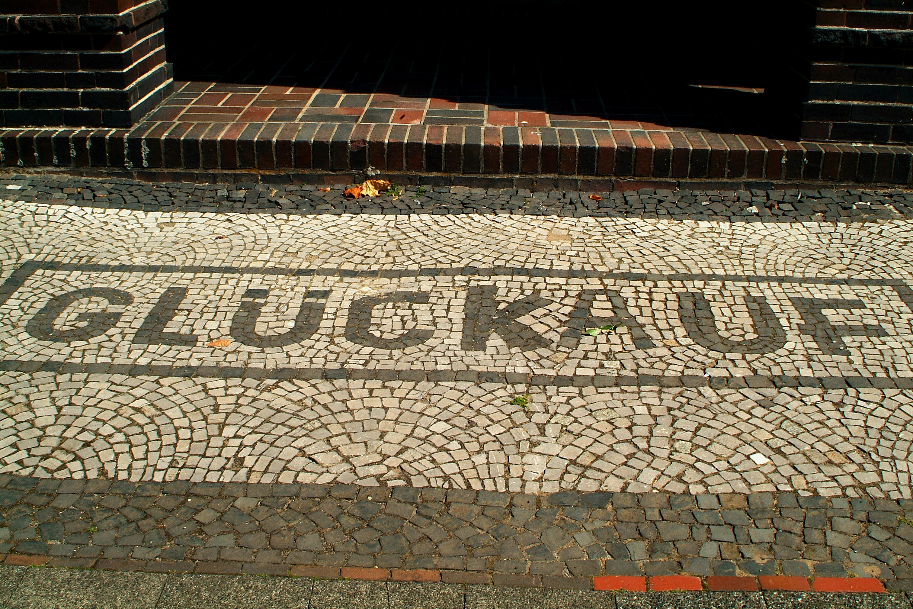 Schriftzug "Glückauf" im Pflaster vor der Stufe zum Eingang des Hochhauses Glückauf in der Südstadt von Hannover ...